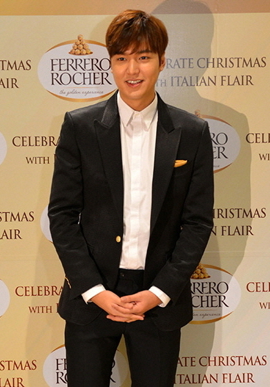 배우 이민호 참석 페레로 로쉐 크리스마스 이벤트 현장